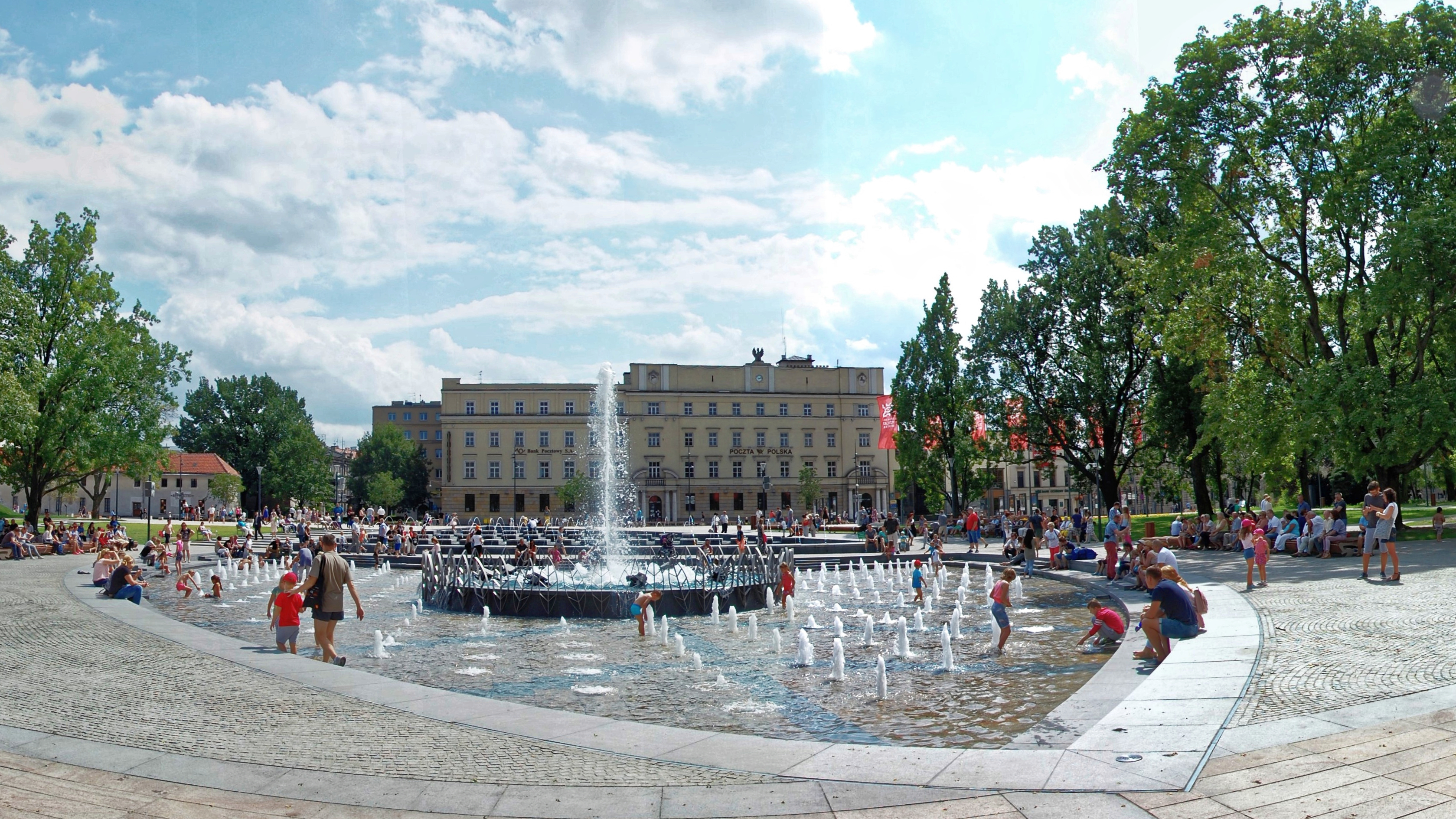 Fontanna multimedialna na placu Litewskim w Lublinie